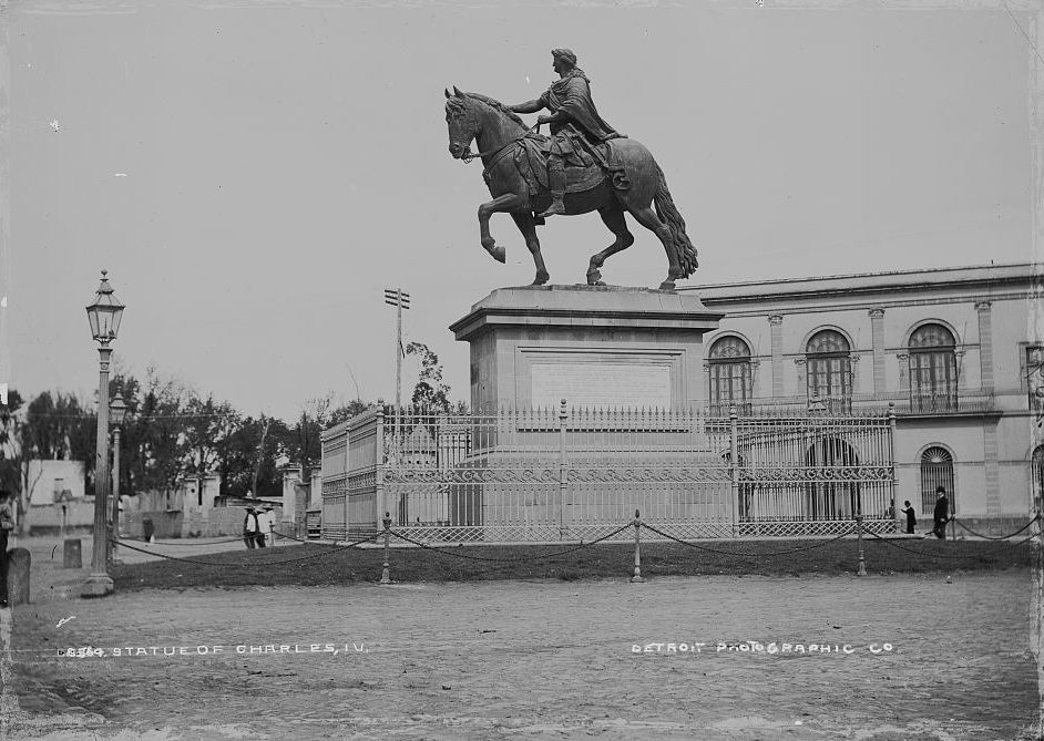 Estatua de Carlos IV de España. Mejor conocida como El Caballito en Paseo de la Reforma y Bucareli en la Ciudad de México